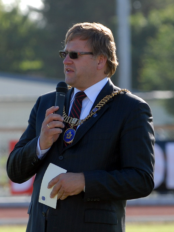 Leif Johan Sevland, ordfører i Stavanger (1995-) åpner Stavanger Games 2007.